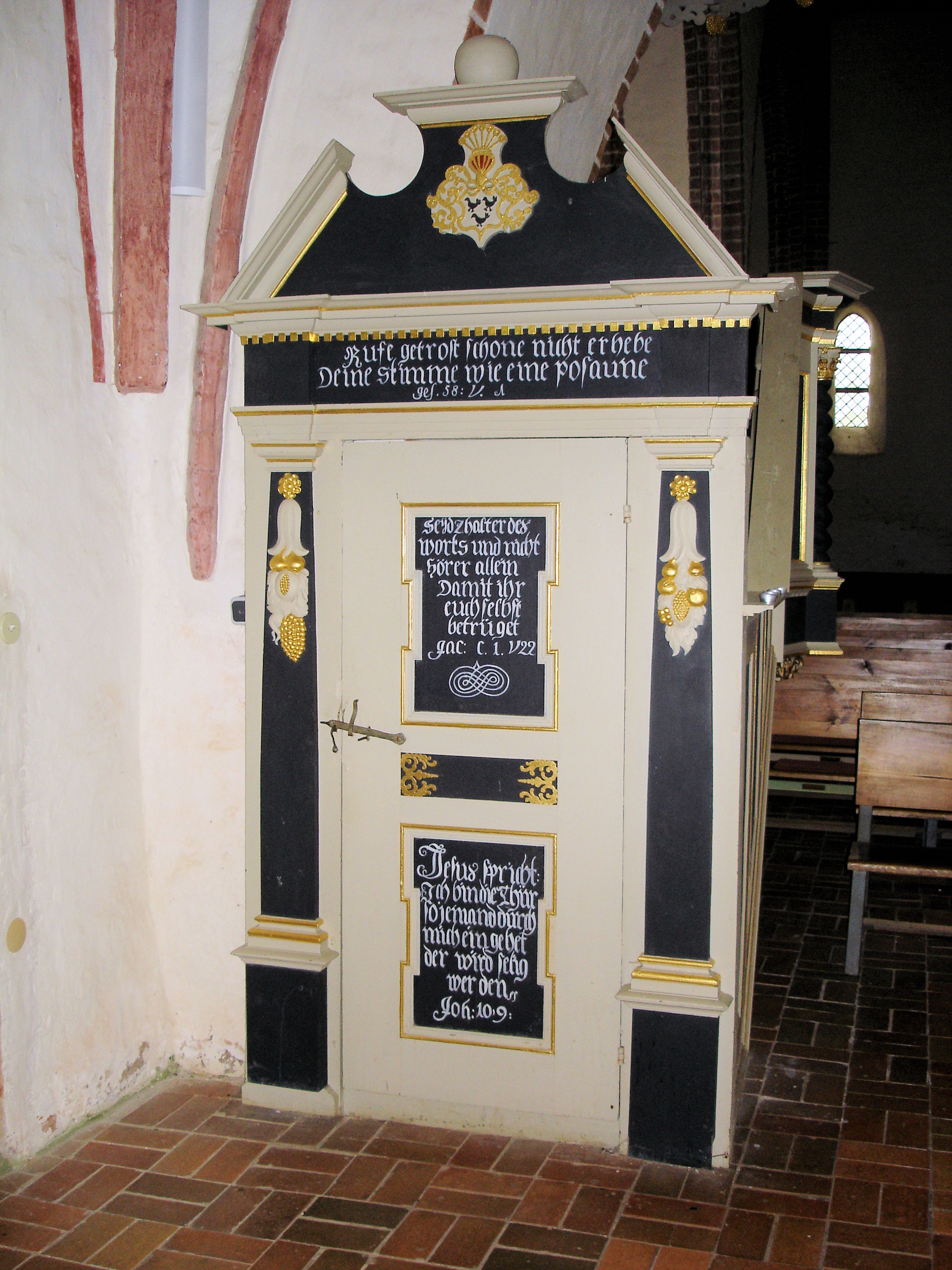 Kirche Basse, Kanzeltür / Church in Basse, door to the pulpit